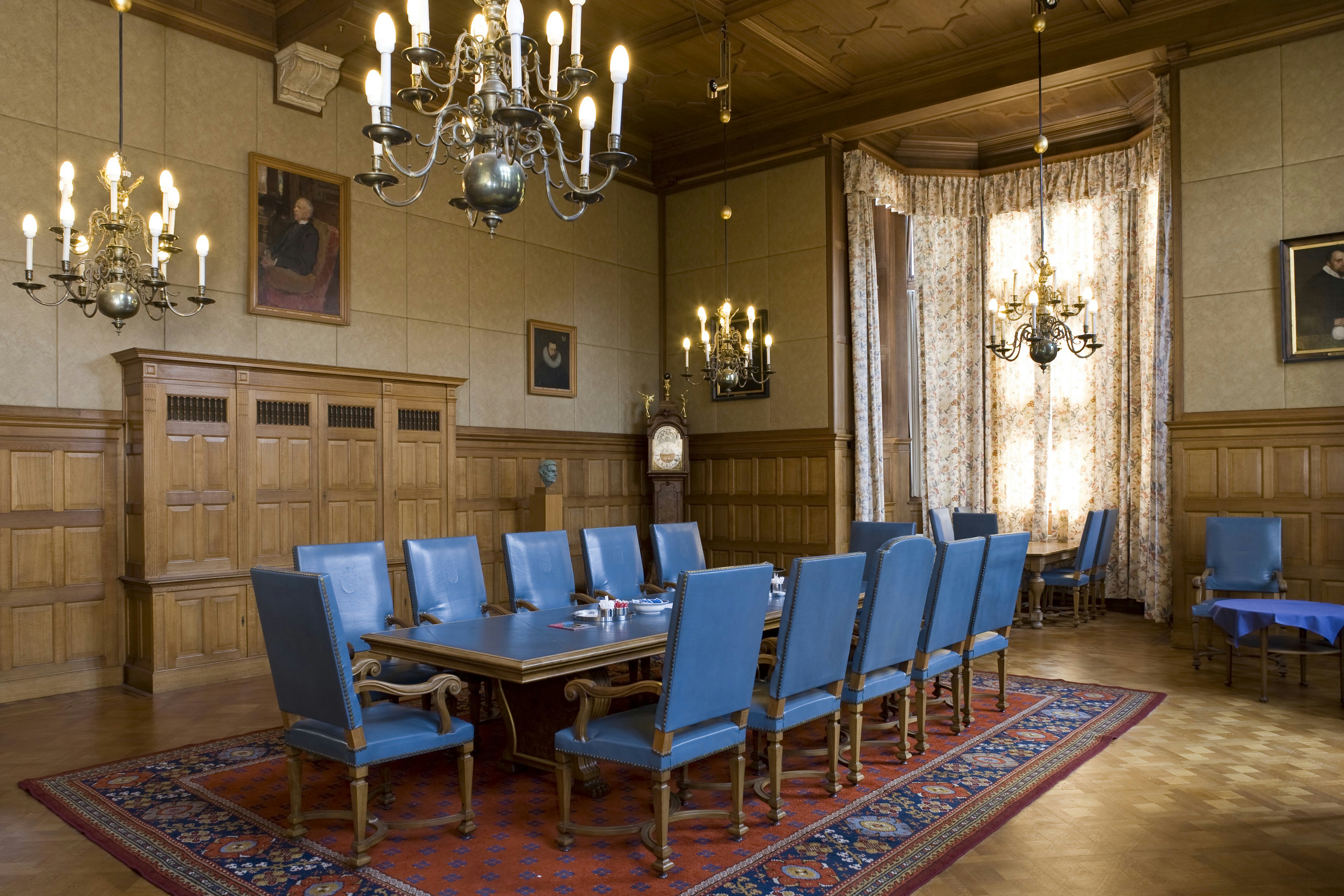 Universiteitsgebouw: Interieur, overzicht van de Curatorenkamer op de verdieping